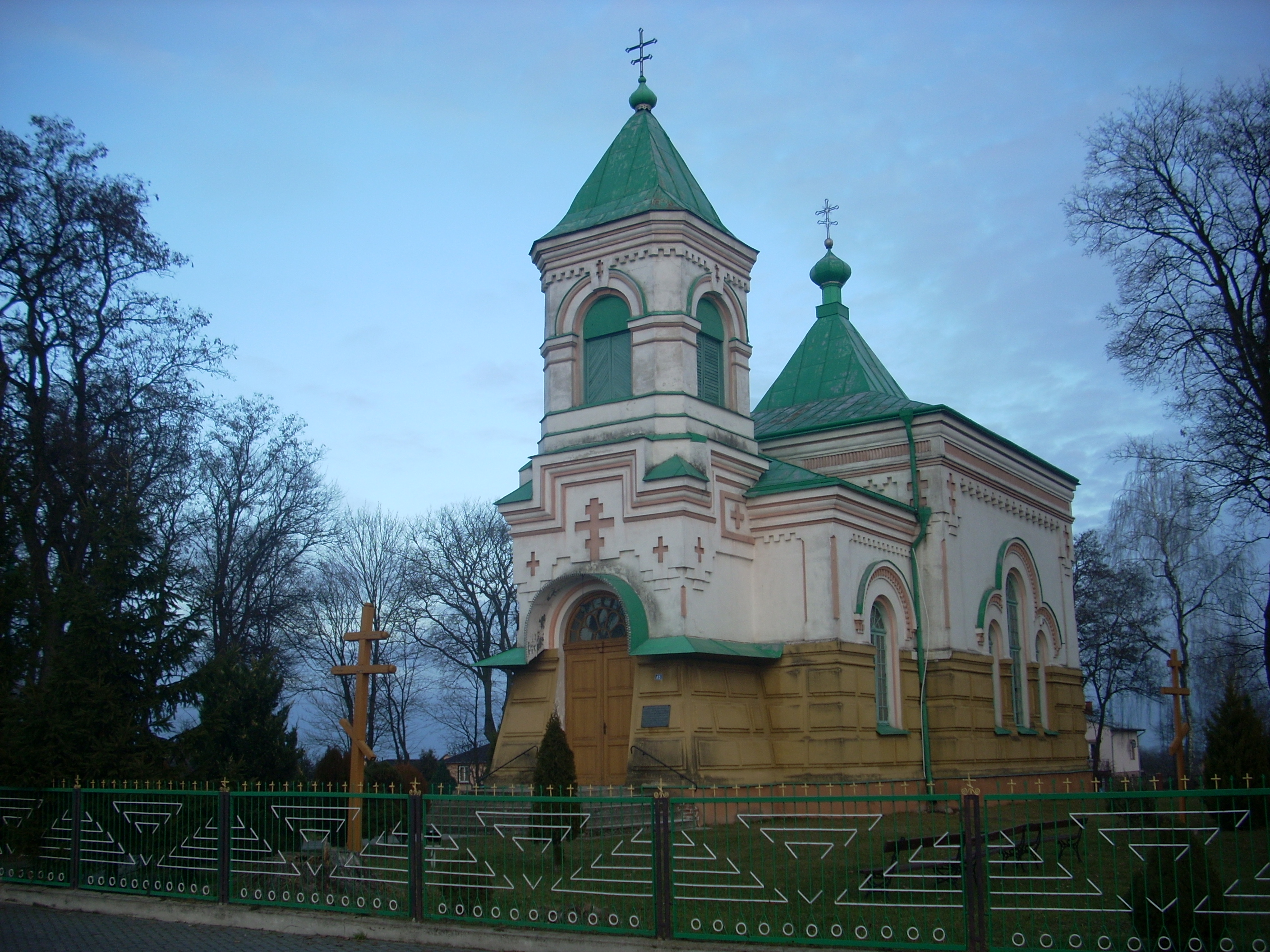 Cerkiew Opieki Matki Bożej w Kobylanach